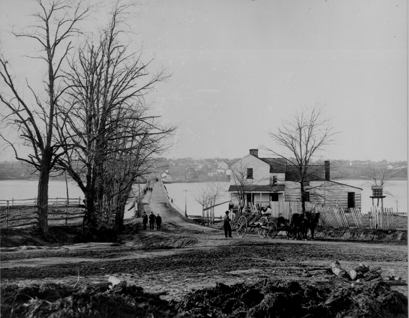 Le Navy Yard Bridge de Washington, DC en 1862.